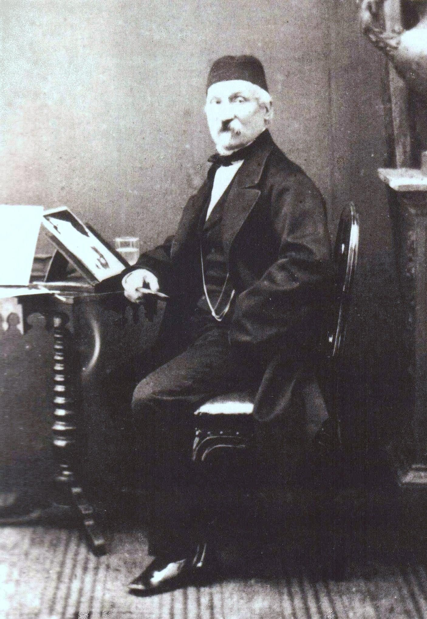 Giuseppe Naudin (1831-1881), pittore parmigiano.